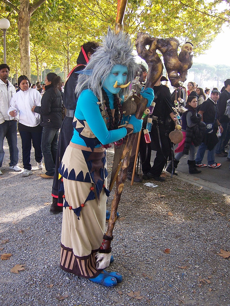 Cosplay di un personaggio del gioco online Wow Durante tutta la manifestazione, le persone possono travestirsi (cosplay in jappone) nel personaggio di un cartone, film, videogioco ed altro.